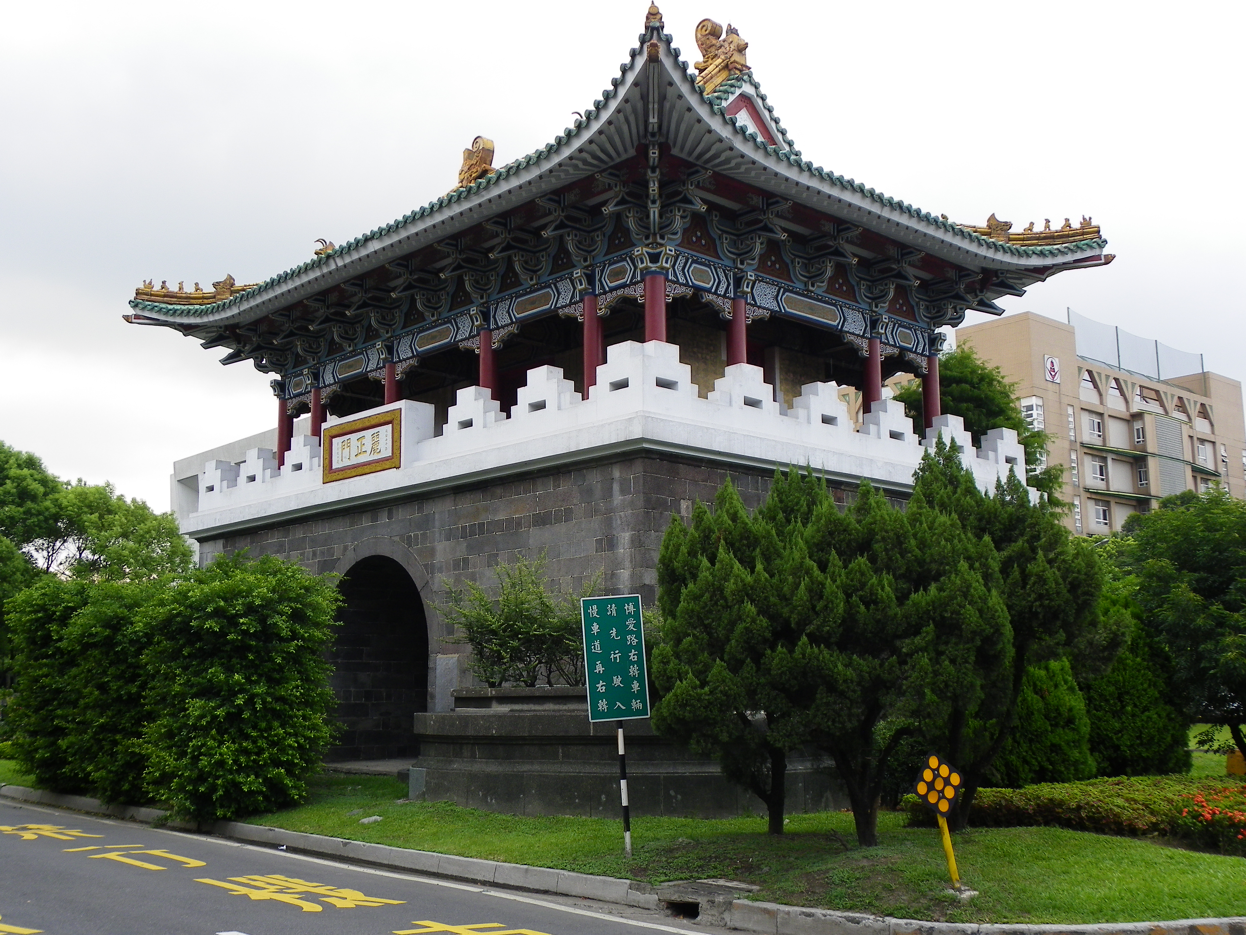 臺北市臺北府城南門東南角。